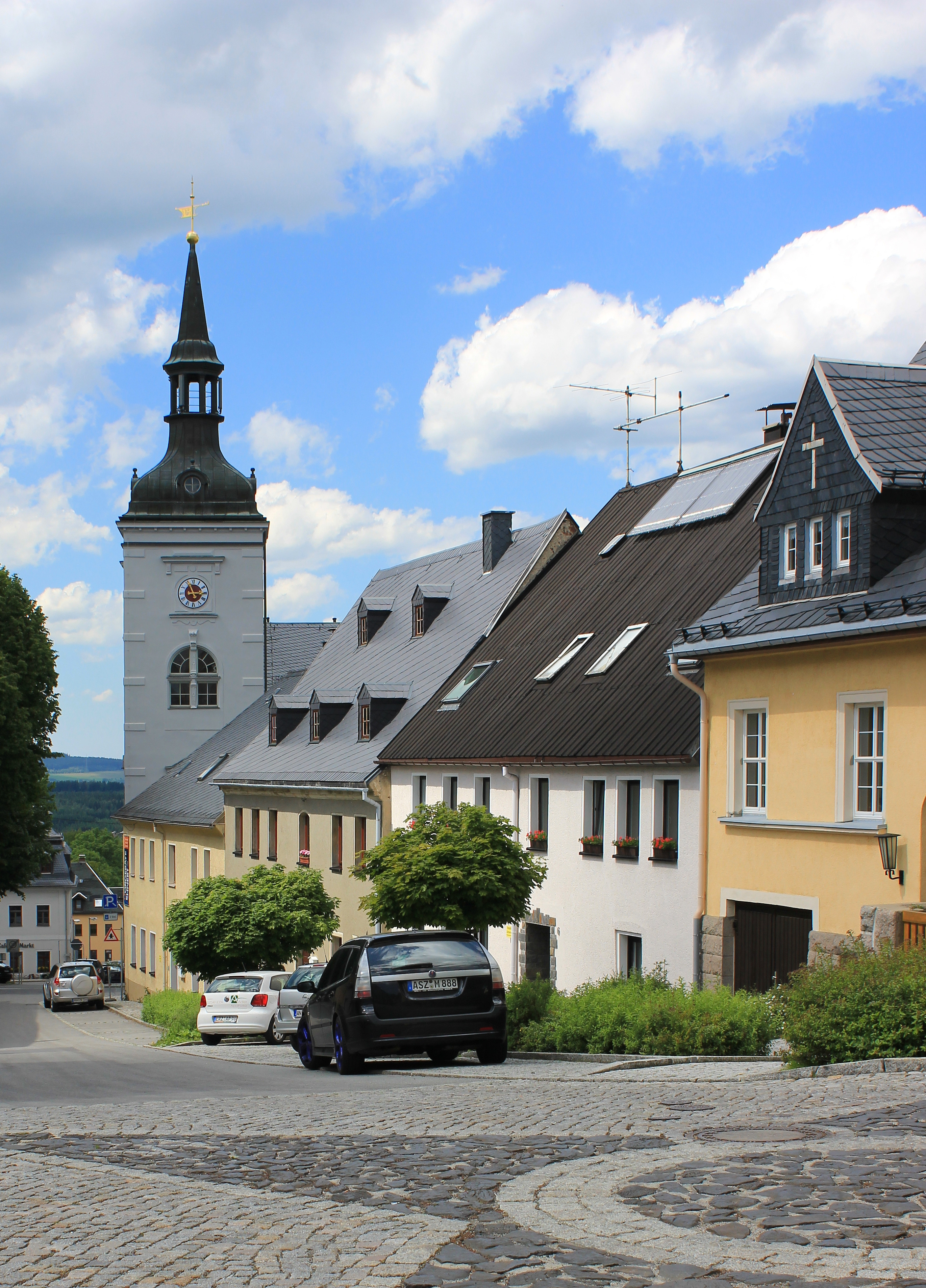 Scheibenberg: Blick durch die Kirchgasse in Richtung Markt. Links gegenüber das Rathaus mit Volutengiebeln und hohem Eckturm im Stil der Neorenaissance um 1900 (Rudolf-Breitscheid-Straße 35).